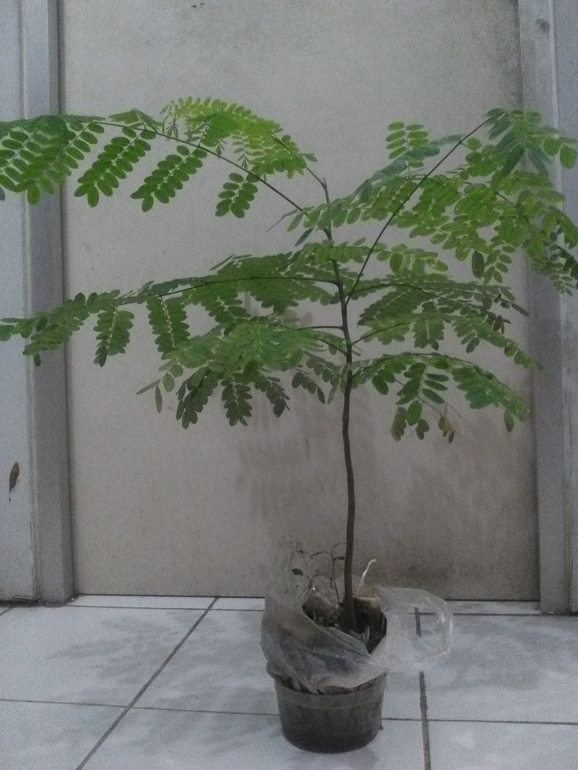 Tanaman Saga Rambat (Abrus precatorius) berusia sekitar satu tahun.